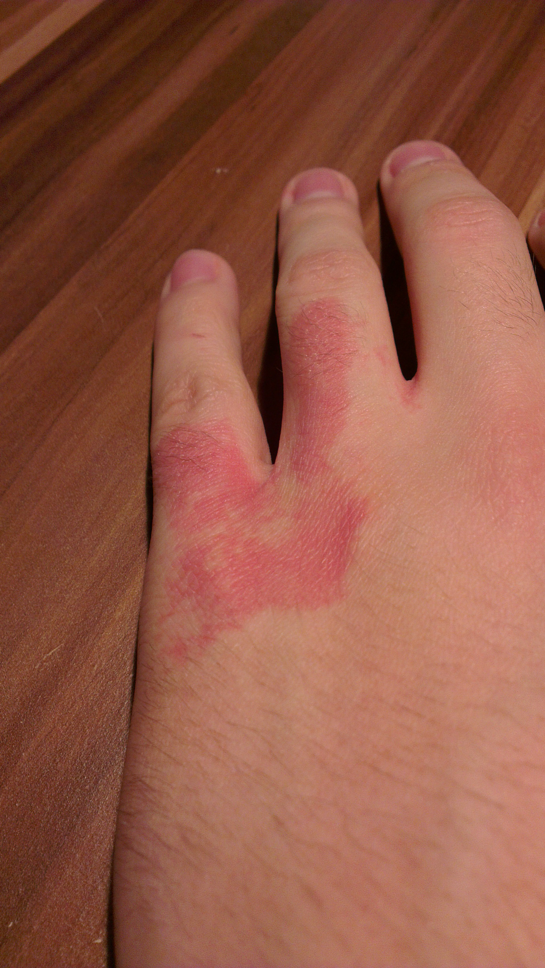 Část levé lidské ruky silně poleptané fenolem.